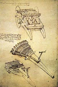 Варианты скорострельных орудий (рисунок Леонардо да Винчи)